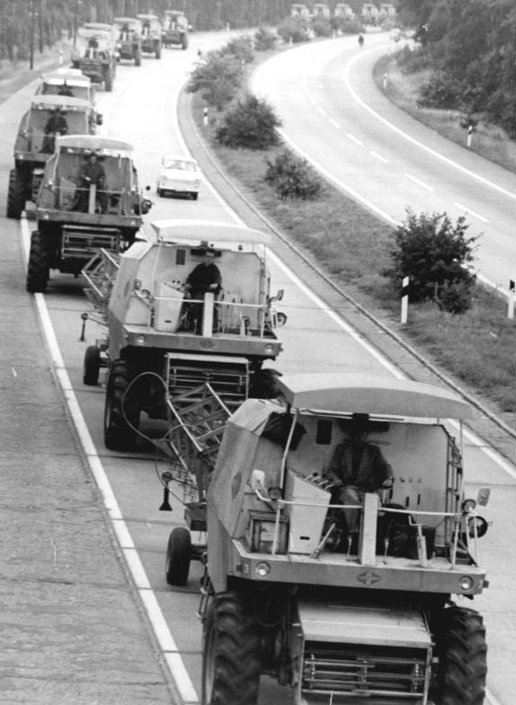 Konvoi von Erntehelfern ADN-ZB Spremberg 20.8.1972 50 Mähdrescher des Tpys E 512 aus zehn Kreisen des Bezirks Cottbus gingen am 20.8.72 auf Fahrt in den Bezirk Neubrandenburg. Die 100 Erntekapitäne und 10 Reparaturbrigaden werden in diesem Schwerpunktgebiet sozialistische Hilfe bei der Bergung des Getreides leisten.